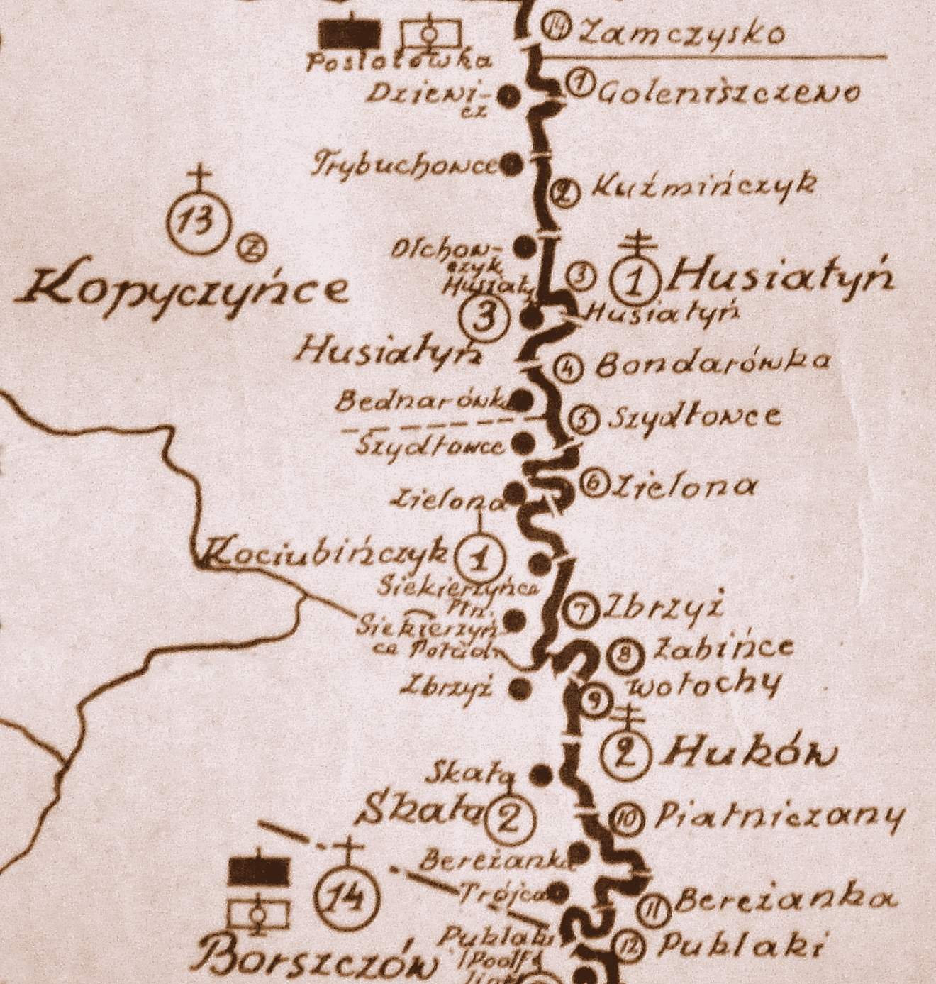 Szkic rozmieszczenia batalionu KOP Kopyczyńce w 1931